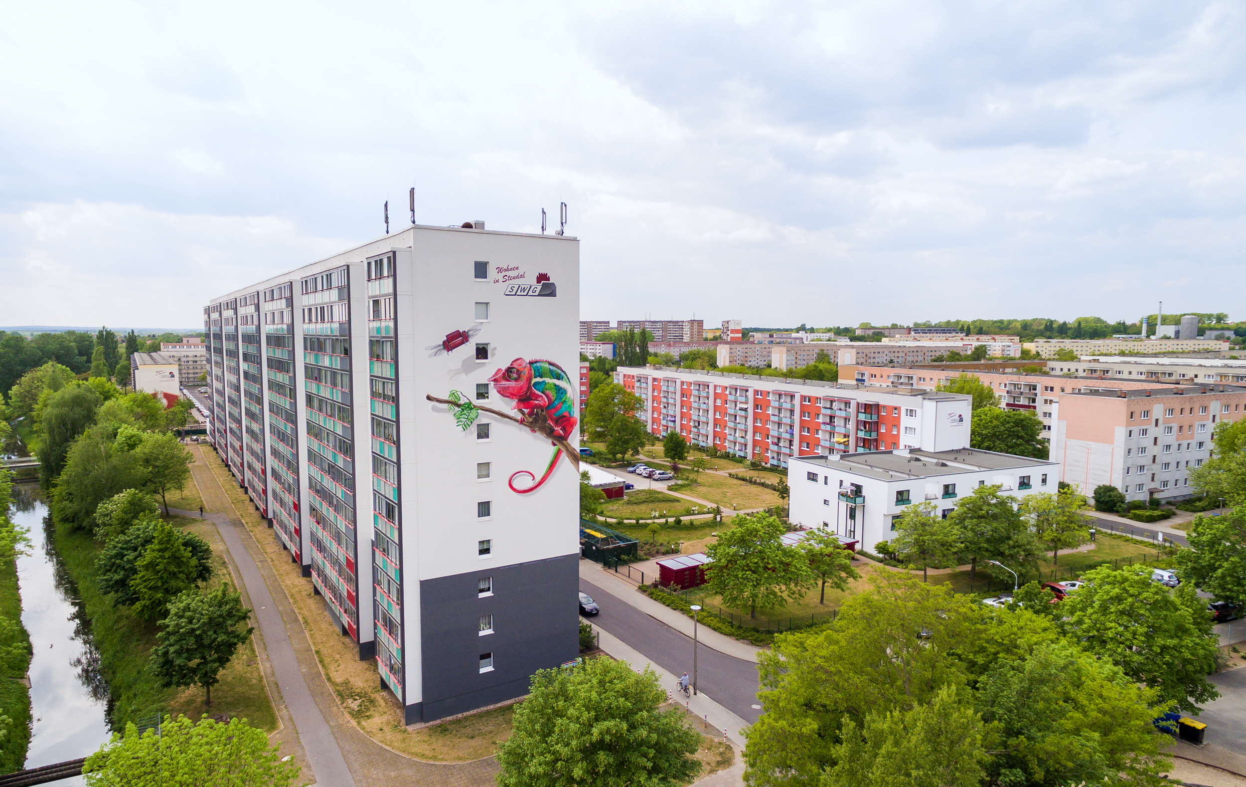 Stendal - Tiergartenviertel